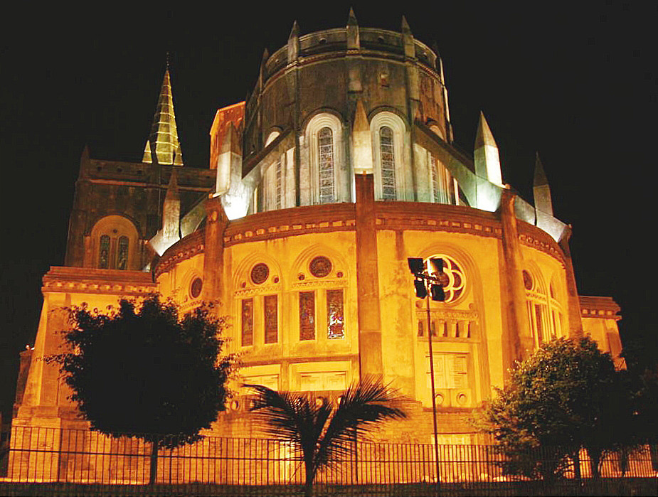 ... pra variar um pouquinho, essa foi daquelas de dentro do carro, sem tripé, nada do que eu queria mas na hora de um medão, sim eu sou medrosa :)))) ... durmam bem e sonhem com os anjos ... beijos tem foto inédita aqui !